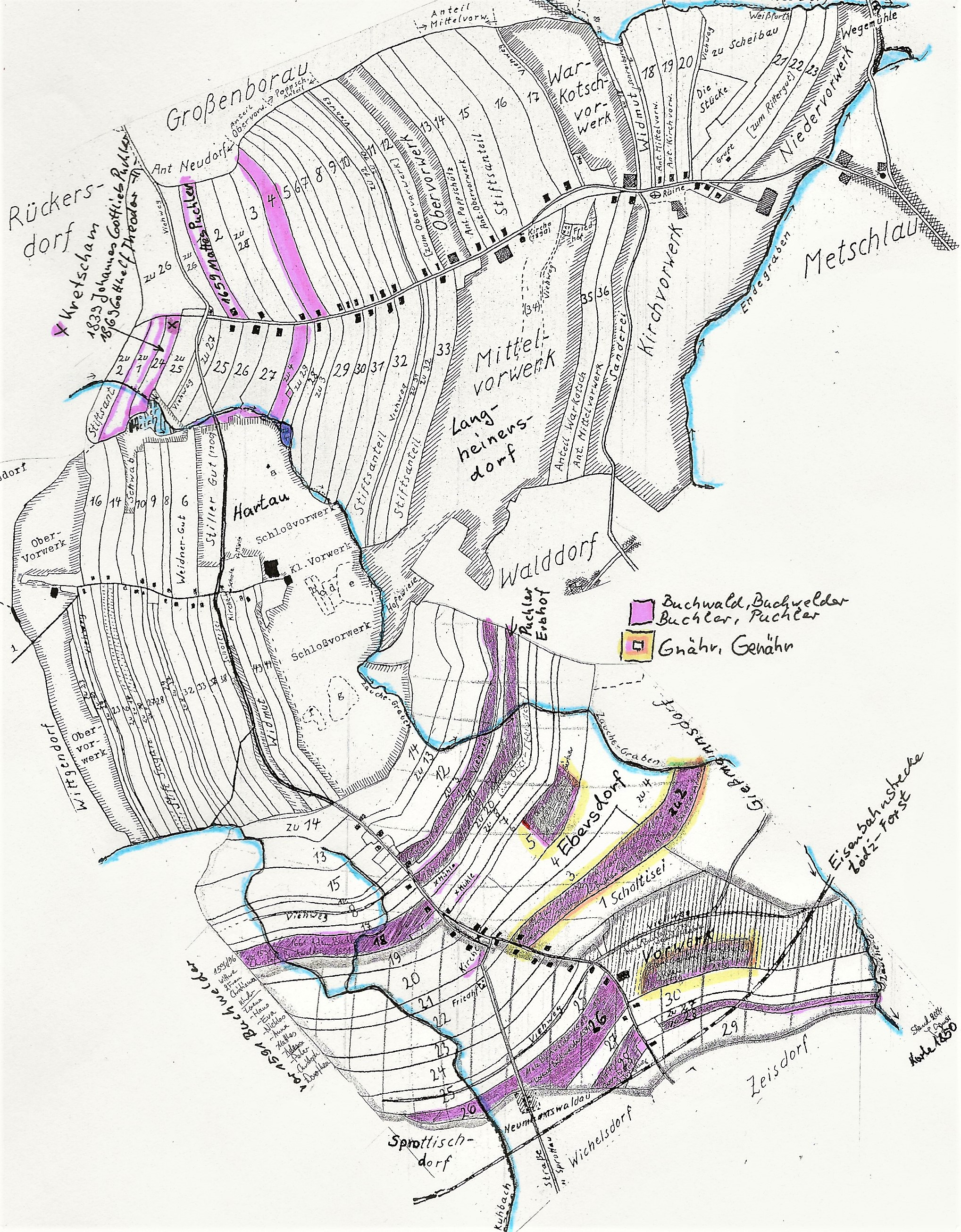 Historische Flurkarte von Ebersdorf mit Nachbargemeinden um 1850, Eintragungen histor. Familien